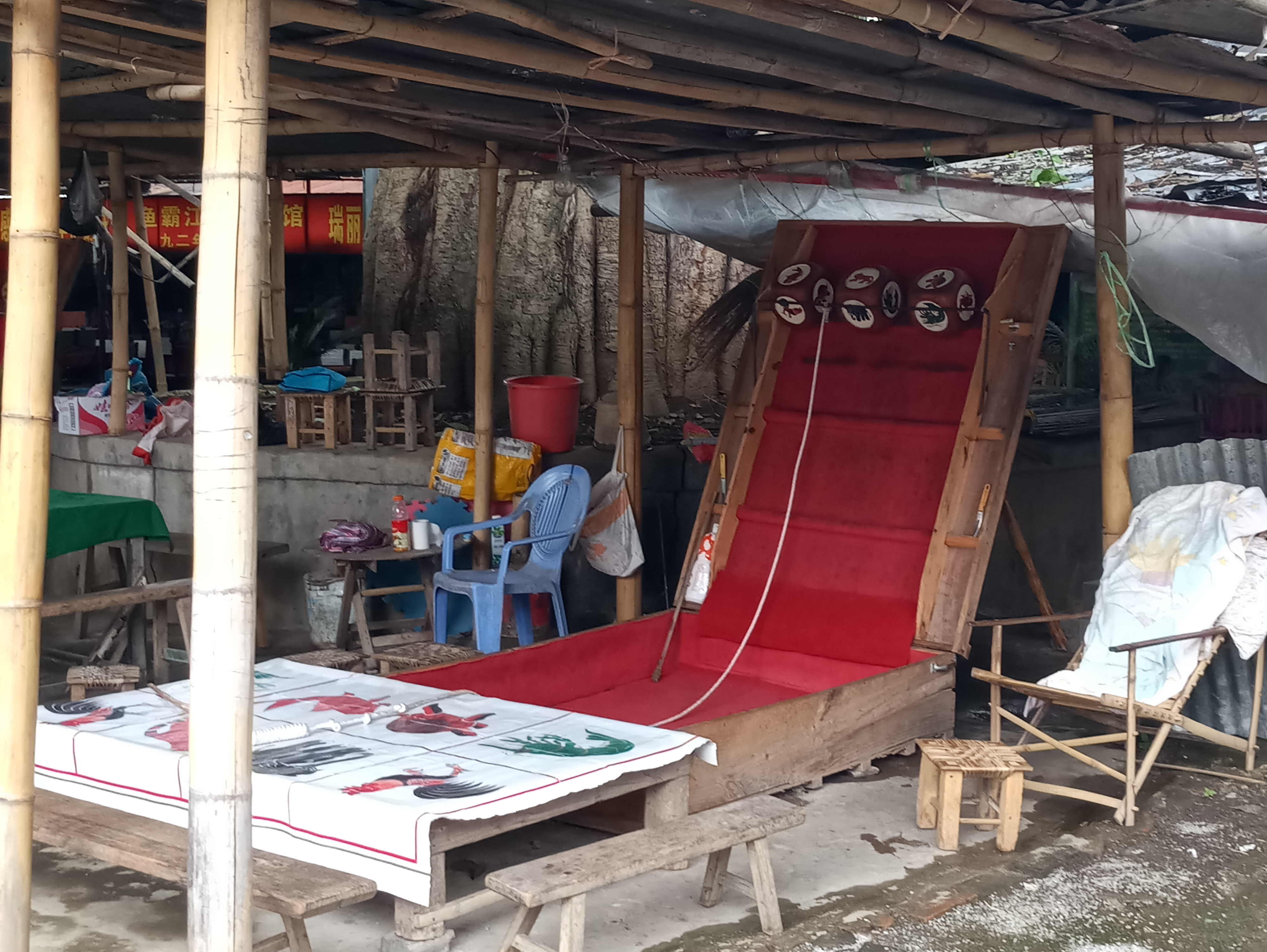 中文（中国大陆）: 姐勒村内一种傣族赌博游戏